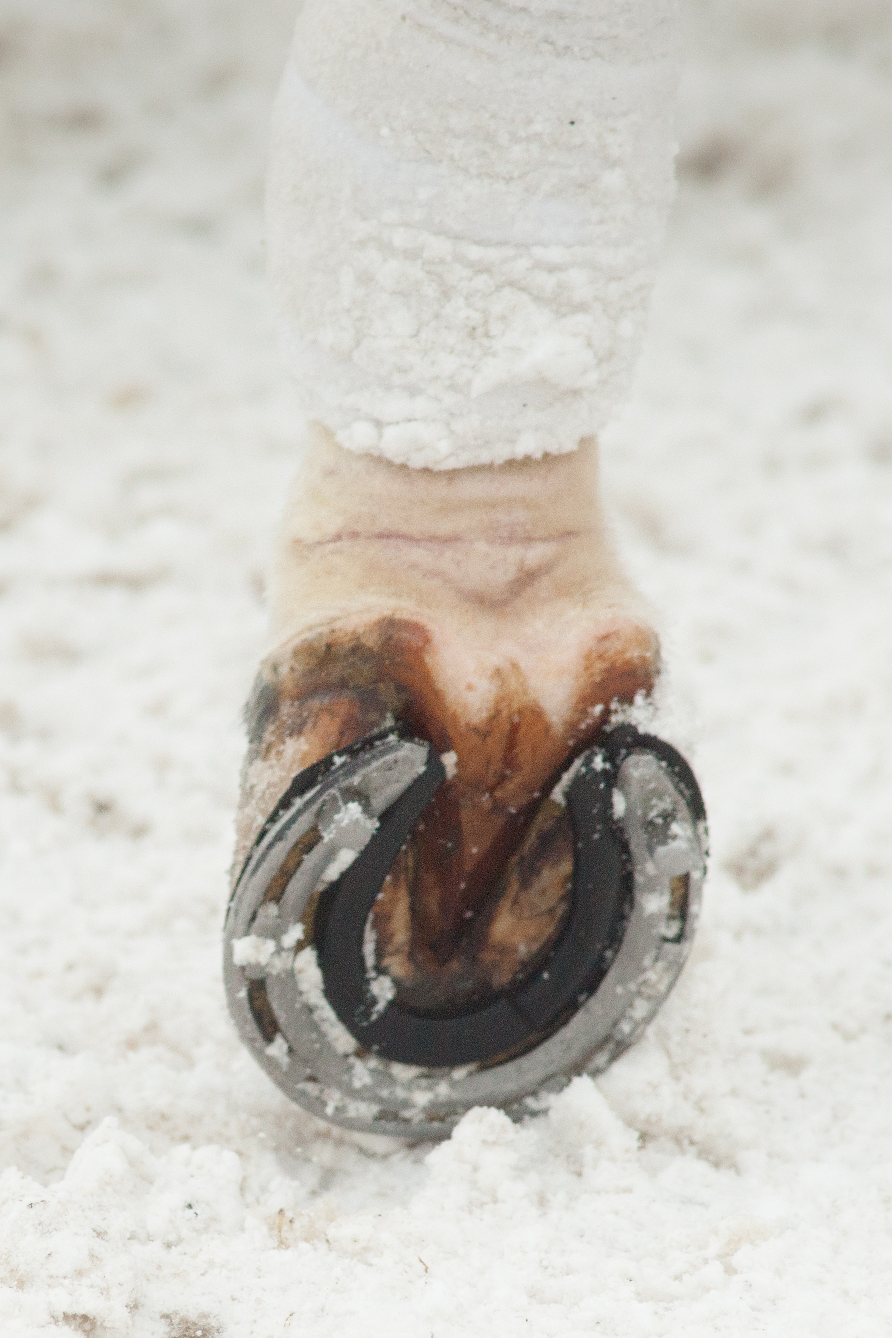 BMW Polo Masters Megève 2014 - sabot